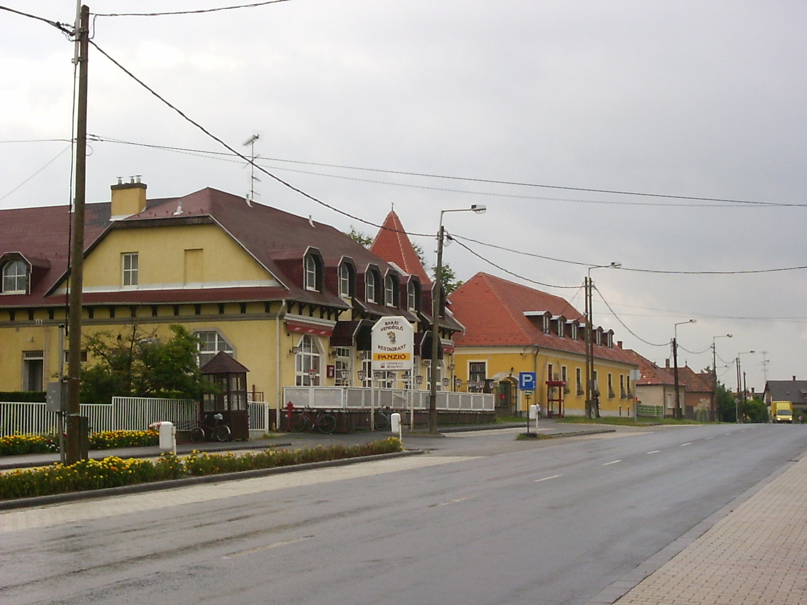 Vendéglő és katolikus iskola (Mezőörs, Magyarország)